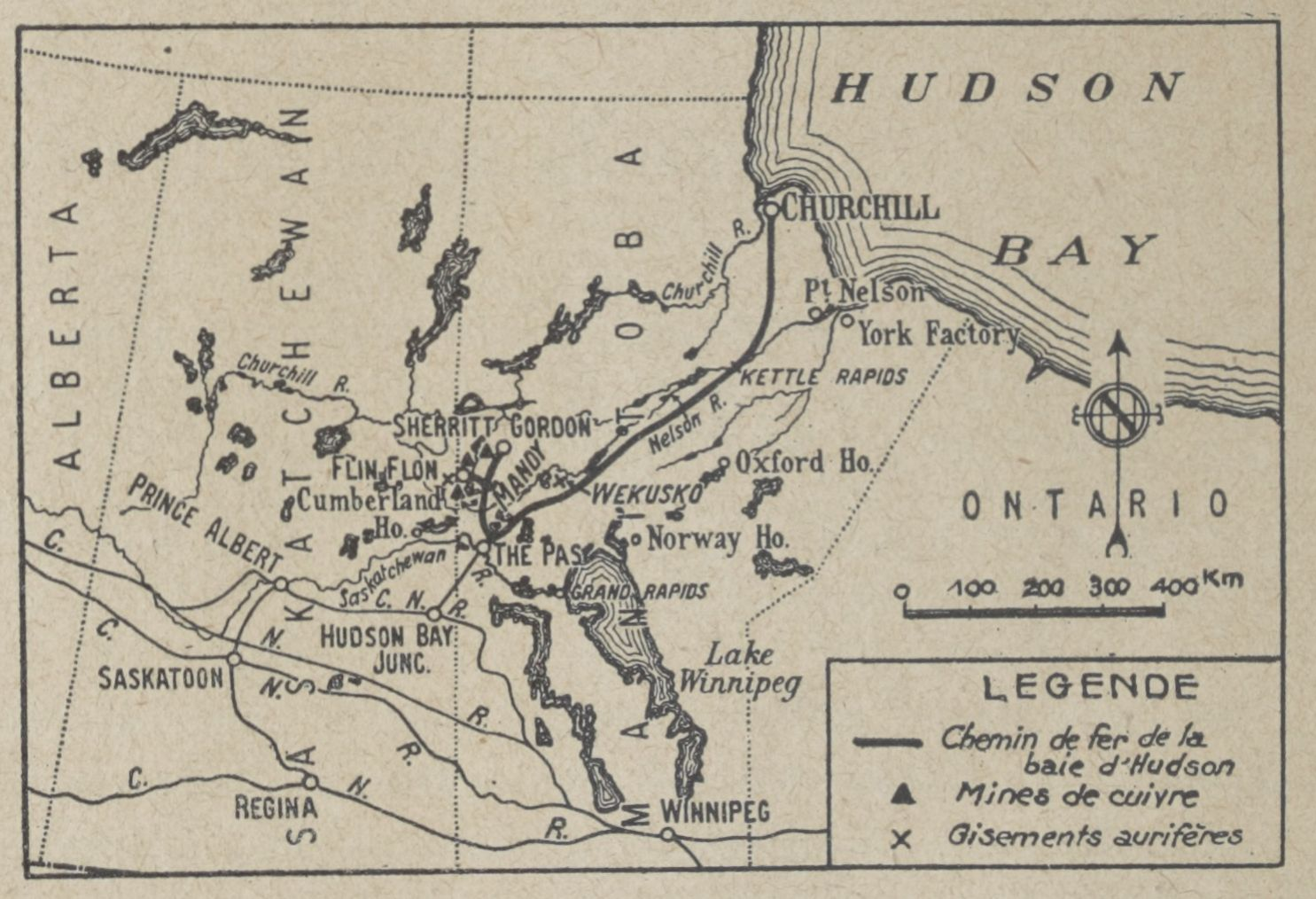 carte Chemin de fer de la Baie d'Hudson Fig 2